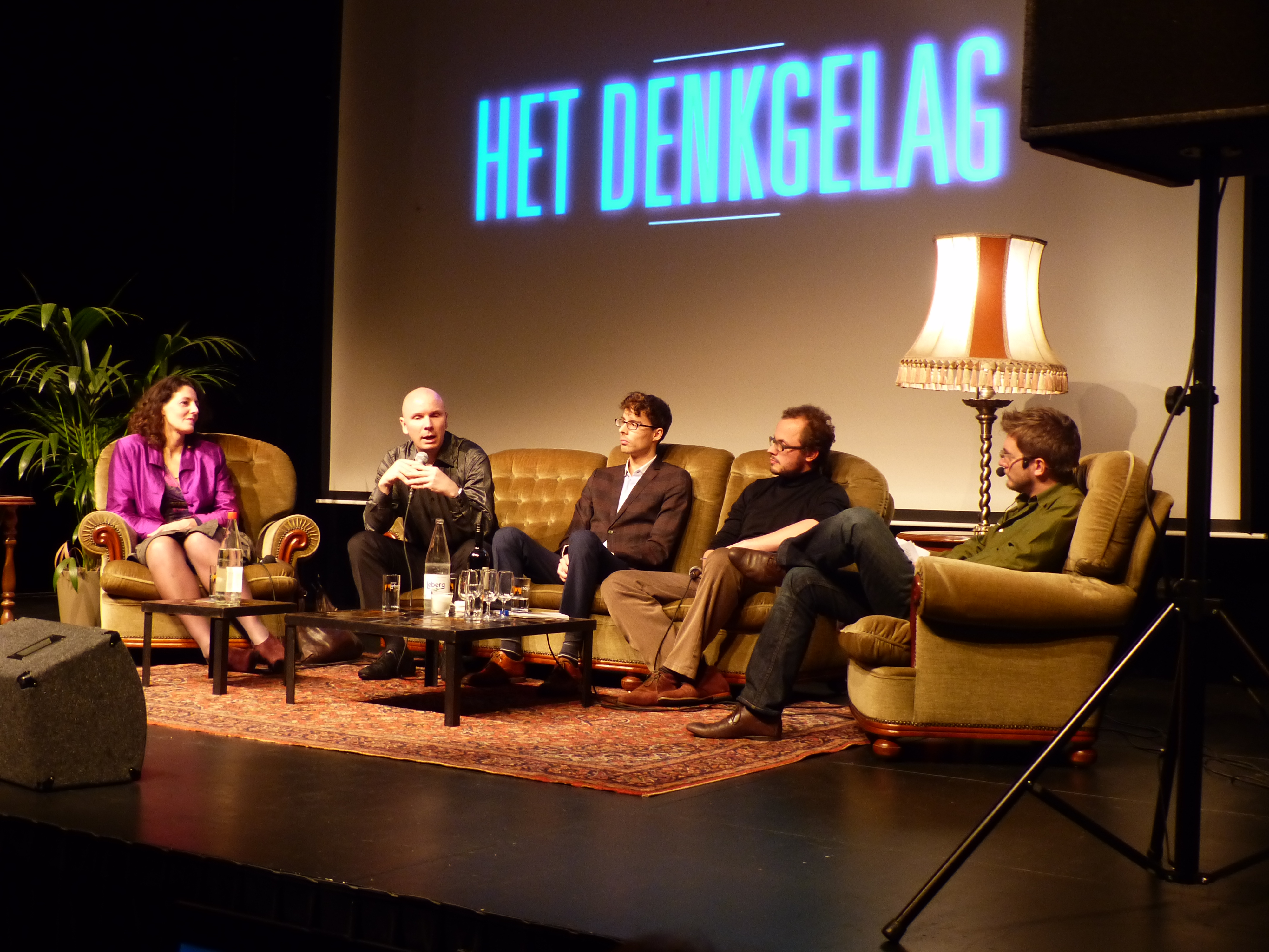 Het Denkgelag, Van Aap tot robot